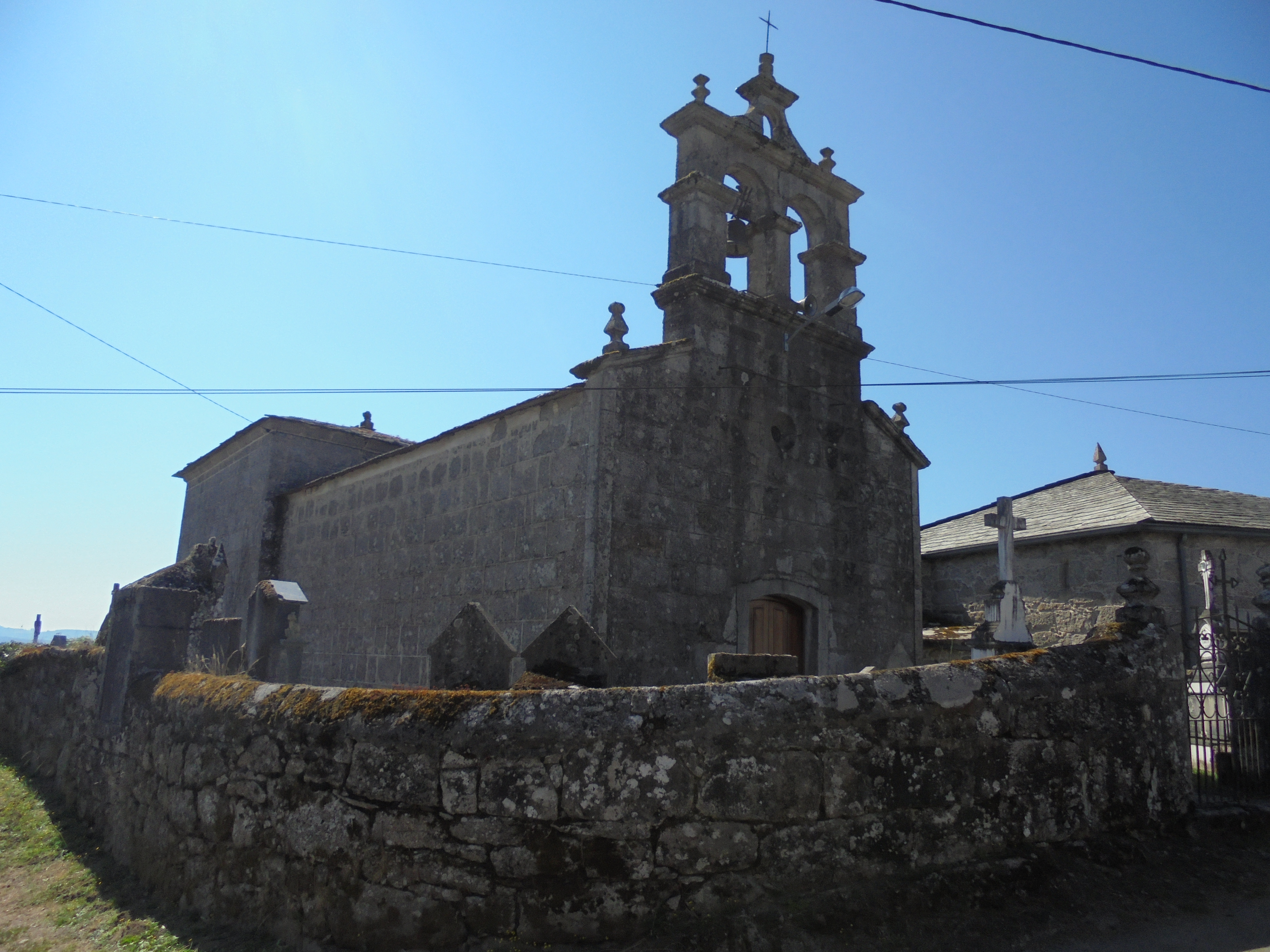 Igrexa parroquial de Arxemil ( O Corgo)